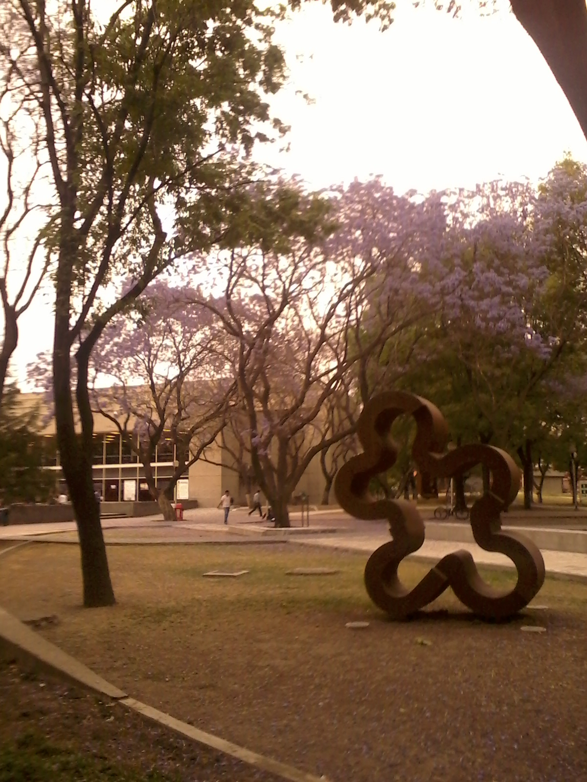 Afuera de la plaza de la Biblioteca de la UAM Azcapotzalco